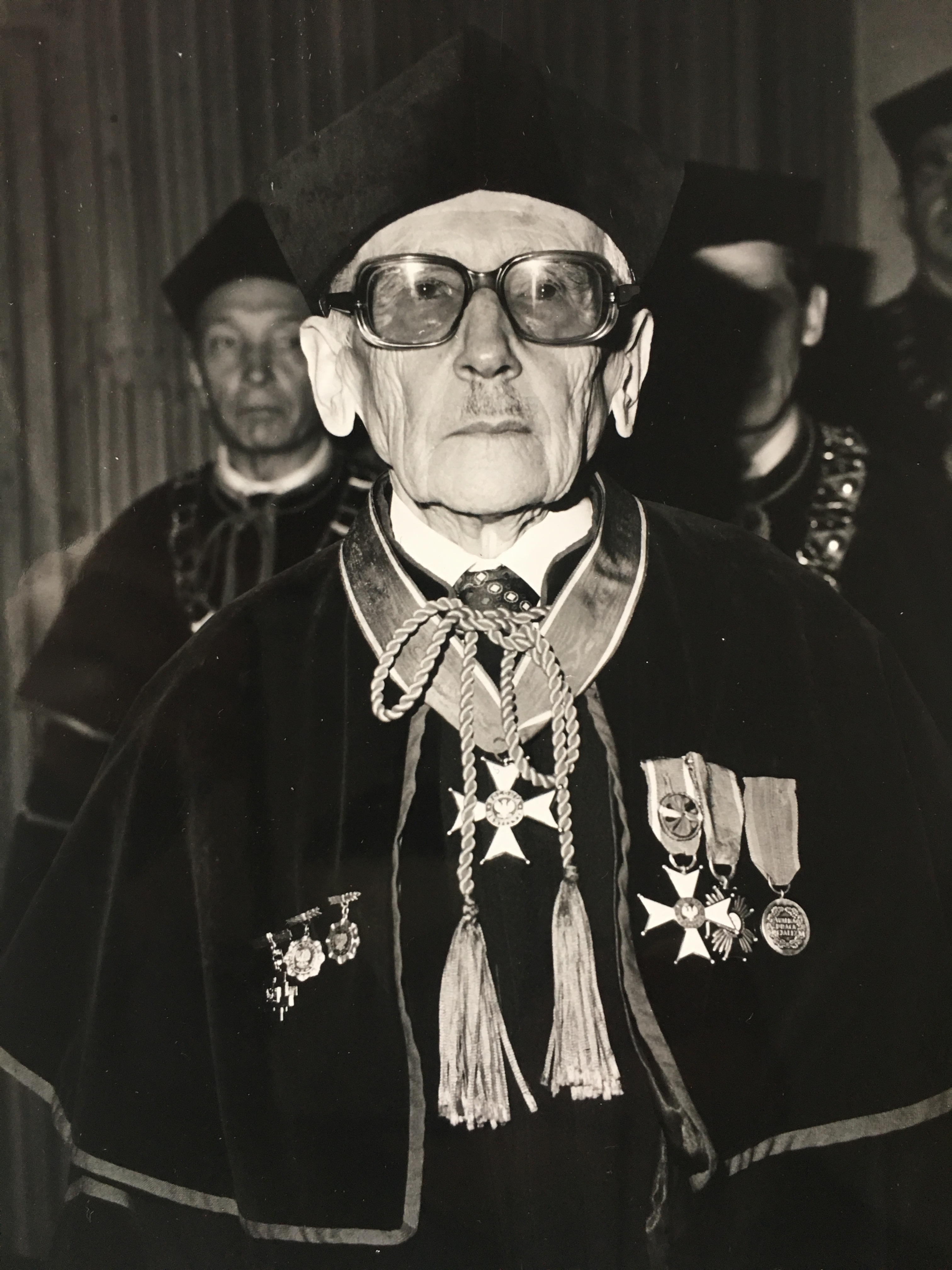 prof. Stefan Kaufman podczas wręczania mu Honoris causa